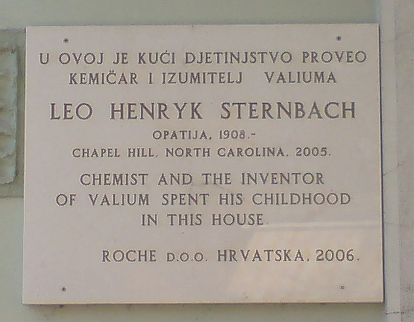 Erinnerungstafel an Leo Sternbach in seinem Geburtsort Opatija, Kroatien